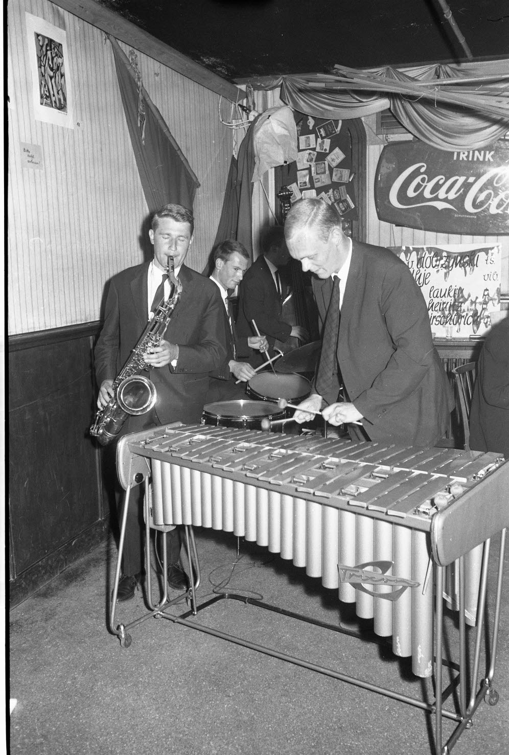 im Jazzclub 61 in der Schuhmacher Straße 27.